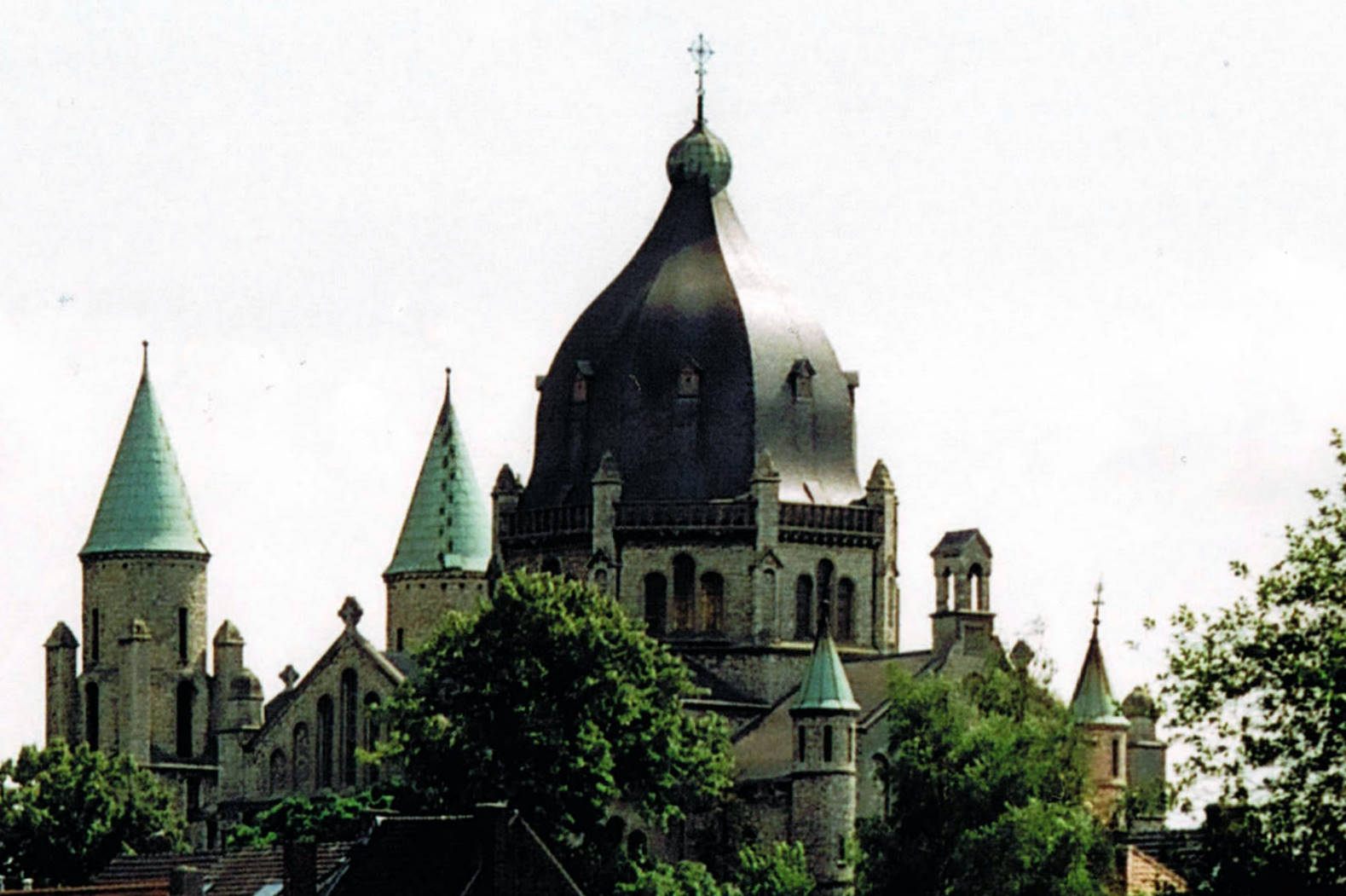 Maastricht 2007 25 Sint Lambertuskerk Maastricht